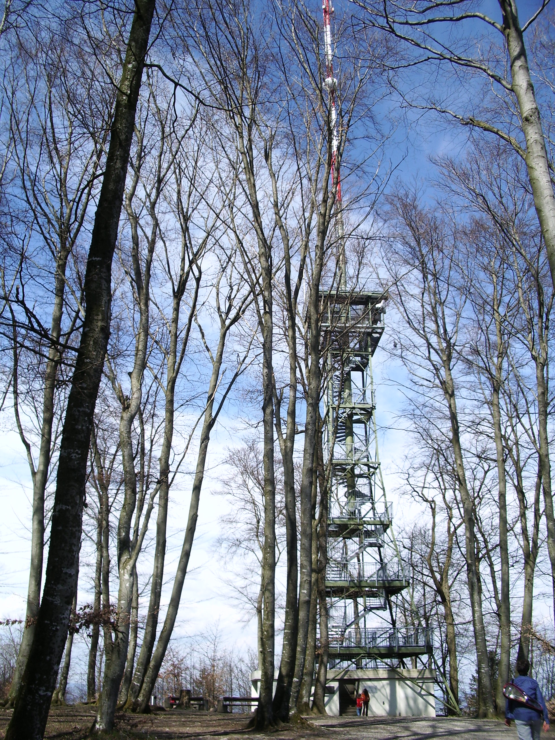 Irchelturm Bild selbst erstellt am 7.4.2007 H.Müller